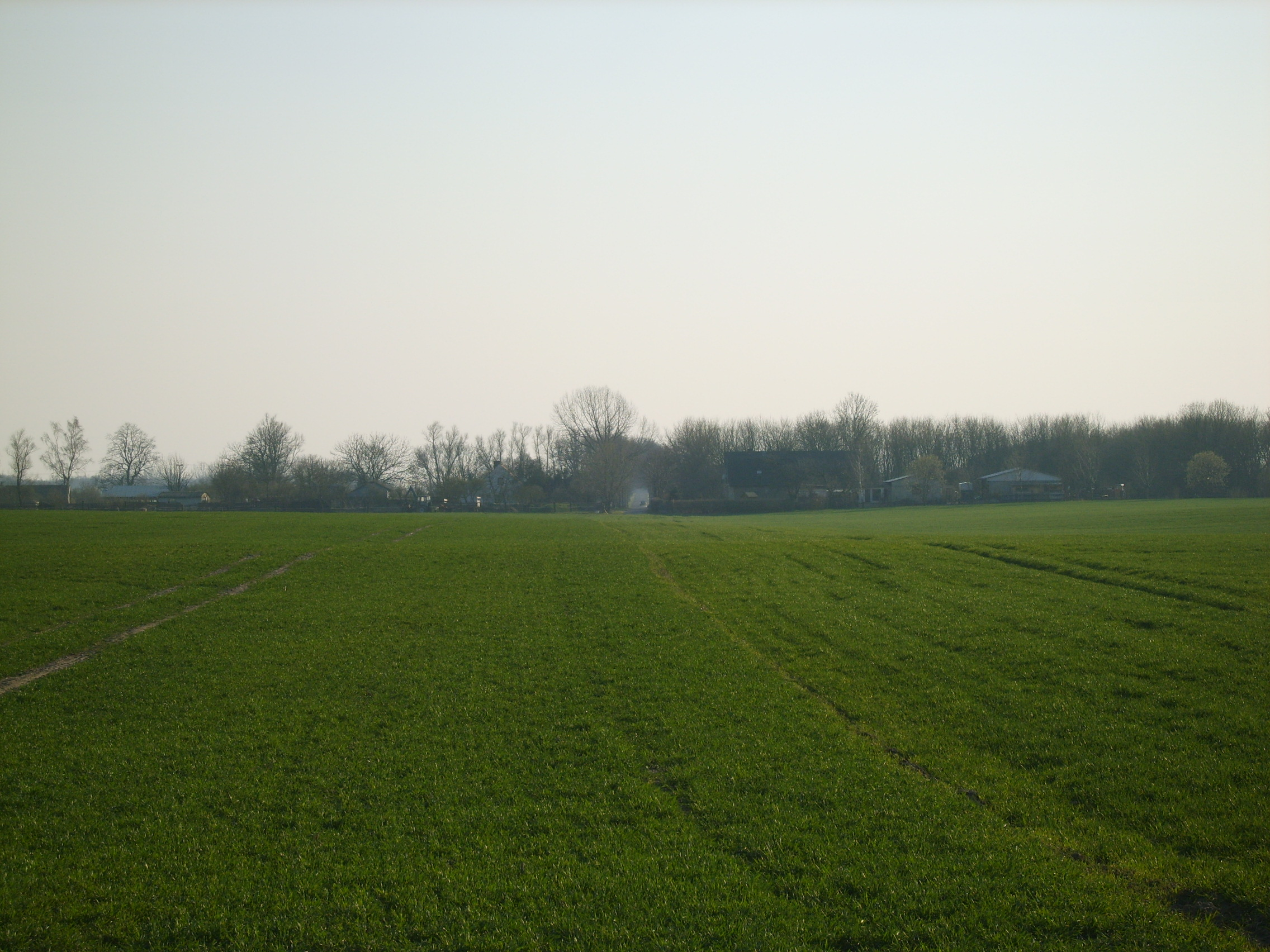 Ortsteil Sanz Hof III.